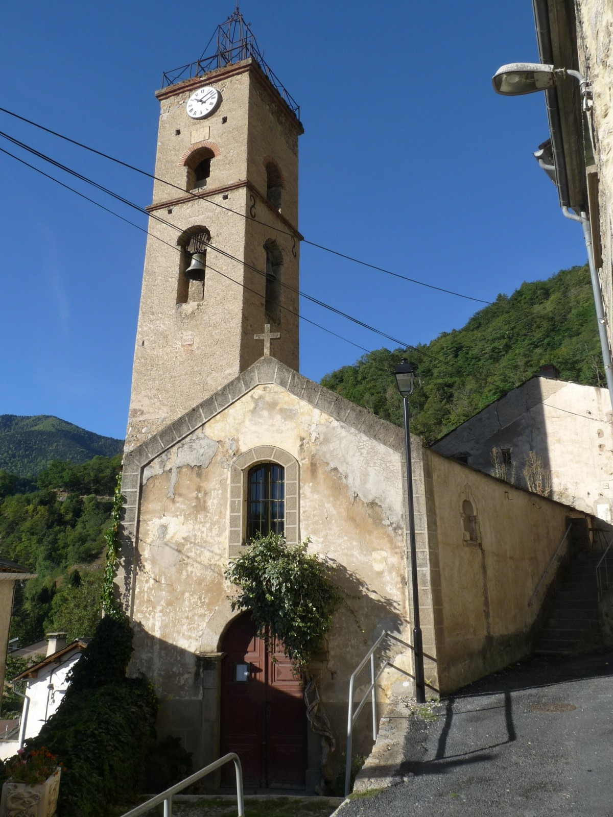 Eglise de Fontpédrouse , Pyrénées-Orientales, France